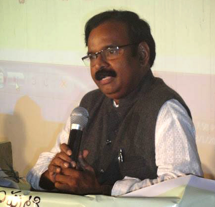 శ్రీనివాస్ వాసుదేవ్